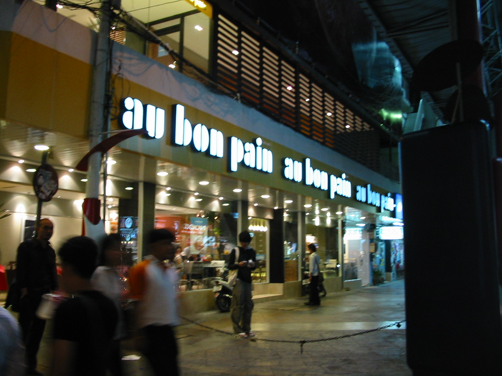 Au Bon Pain at Siam Square